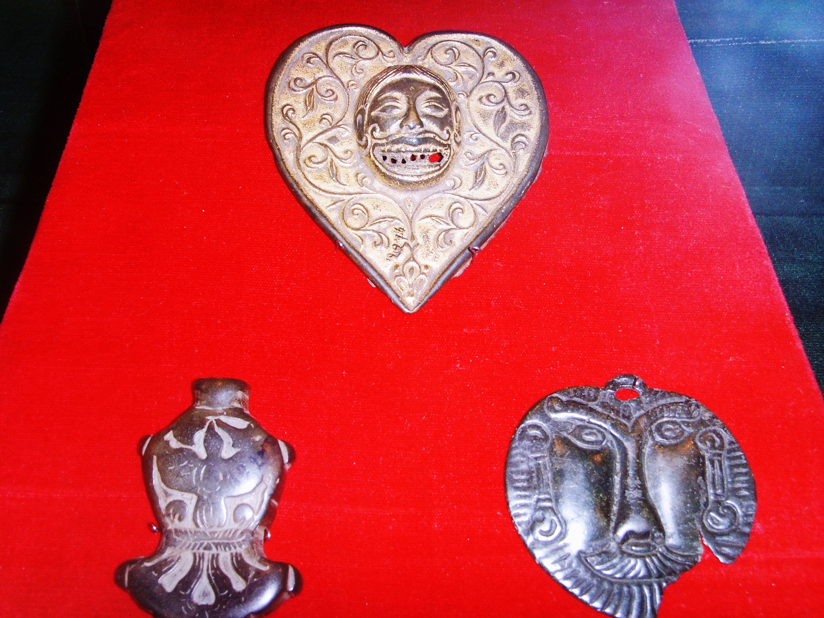 Кыргызская торевтика